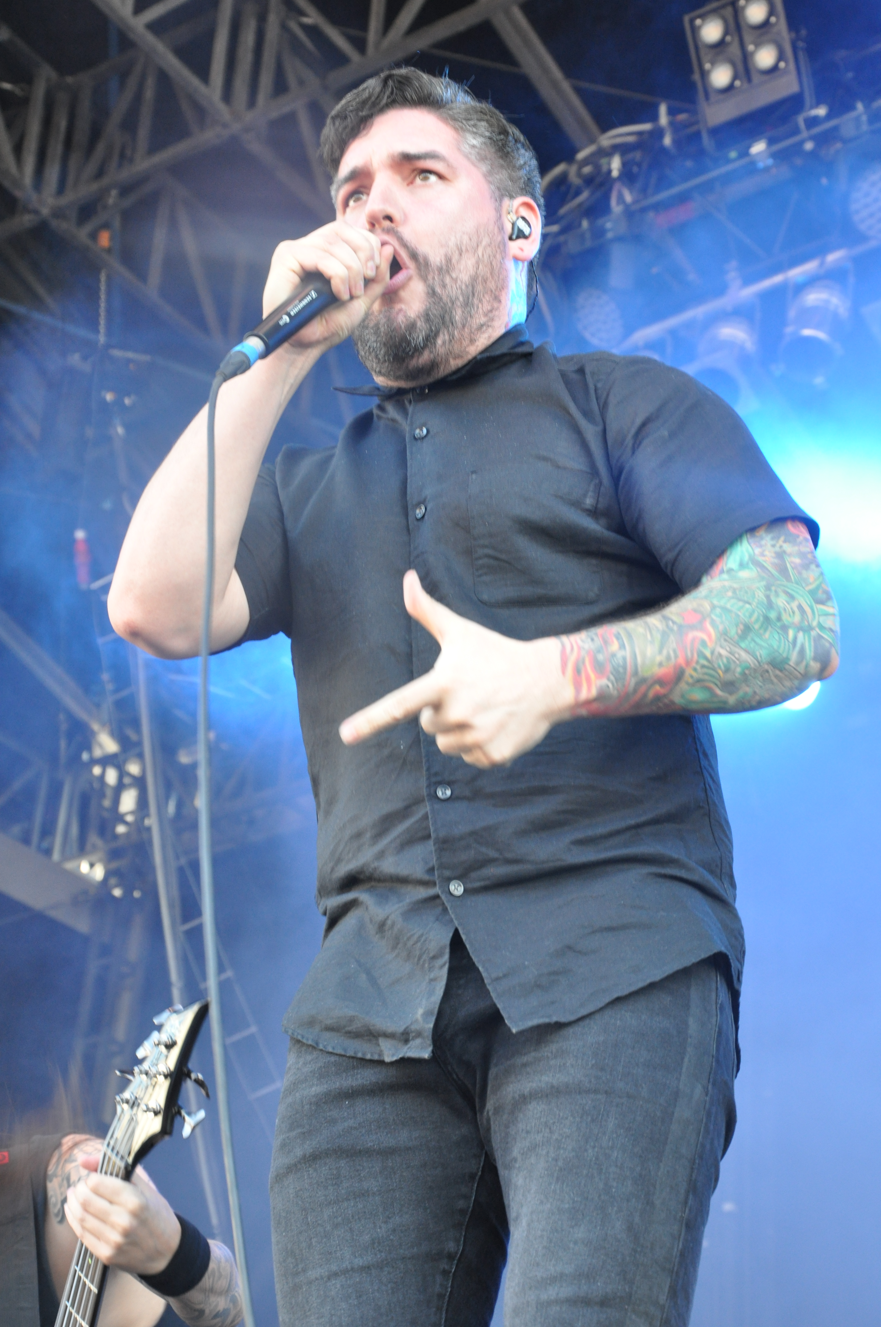 Suicide Silence auf der Clubstage bei Rock am Ring 2014